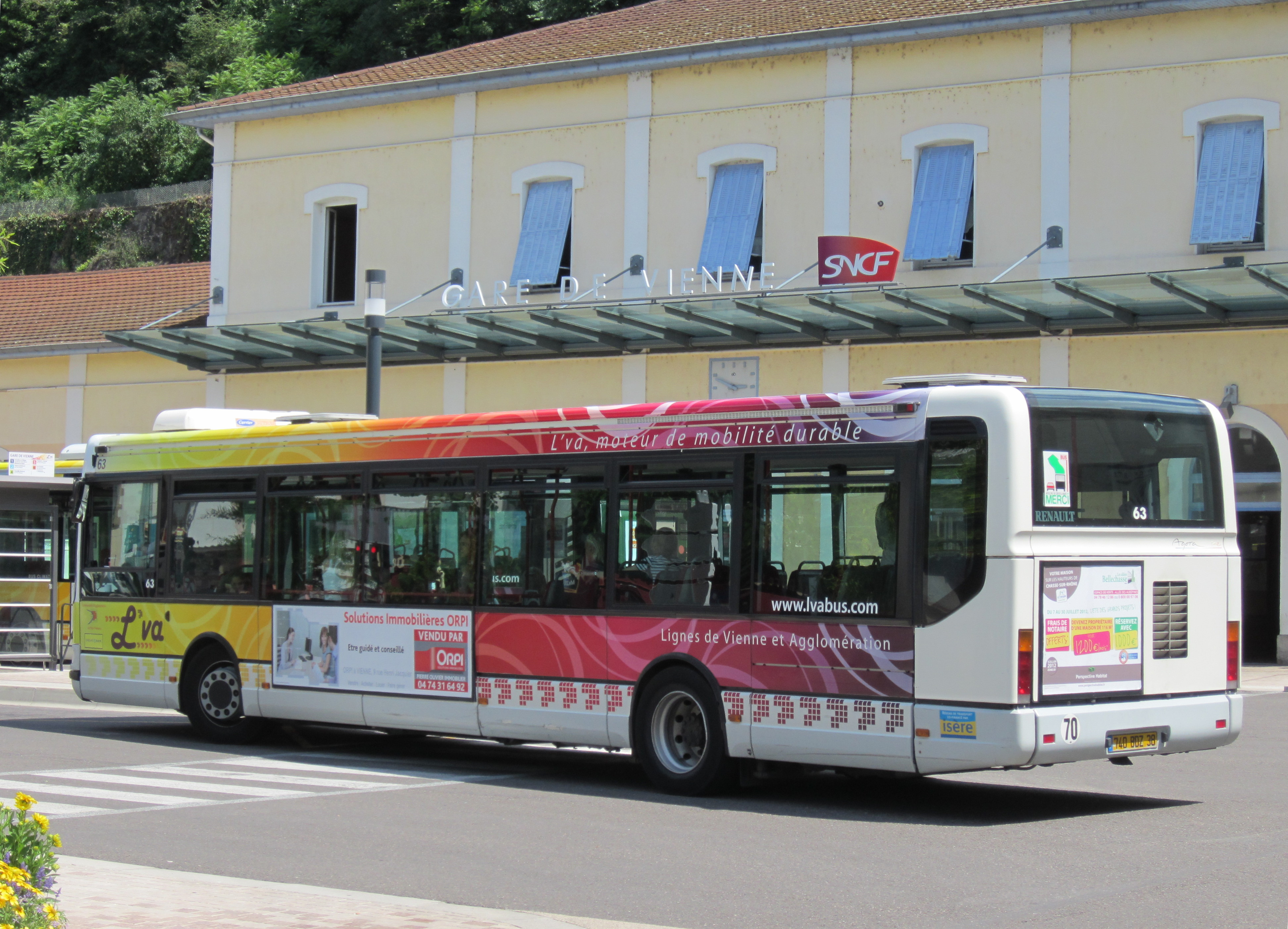 Irisbus Agora Line n°63 du réseau L'va de Vienne, devant la gare SNCF.